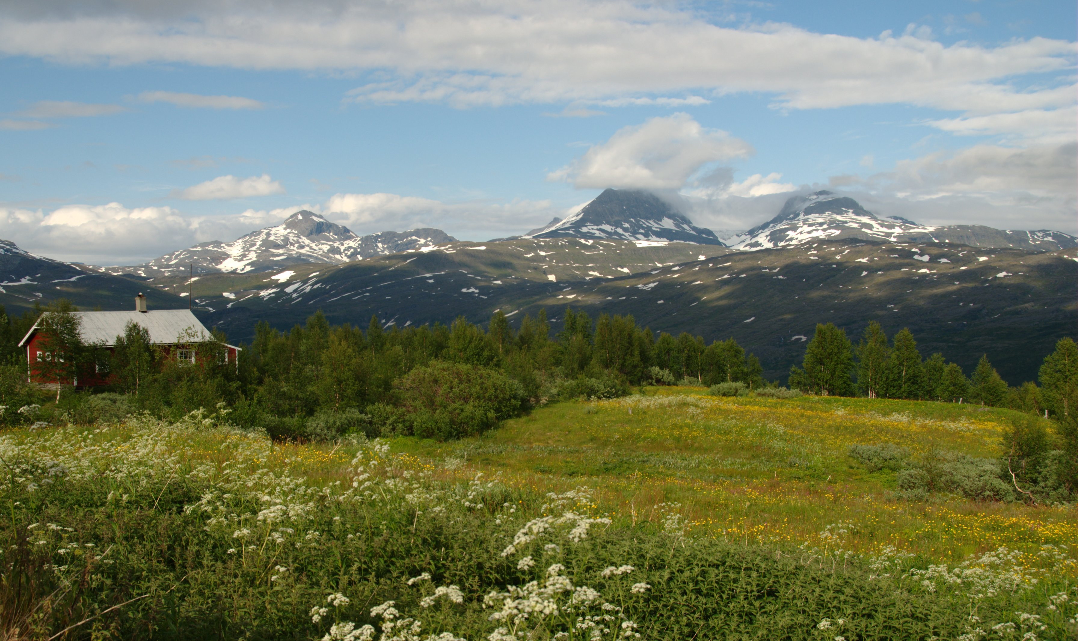 Utsikt frå Jakobsbakken